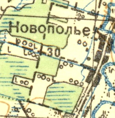 Топографическая карта Ленинградской области, квадрат О-35-12-Г (Ропша), деревня Новополье